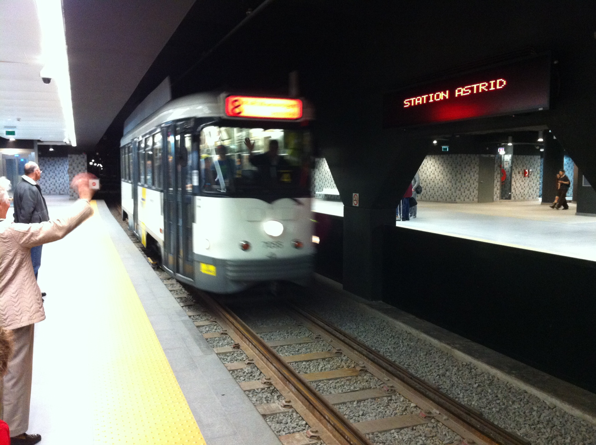 Metro Astrid - Tram